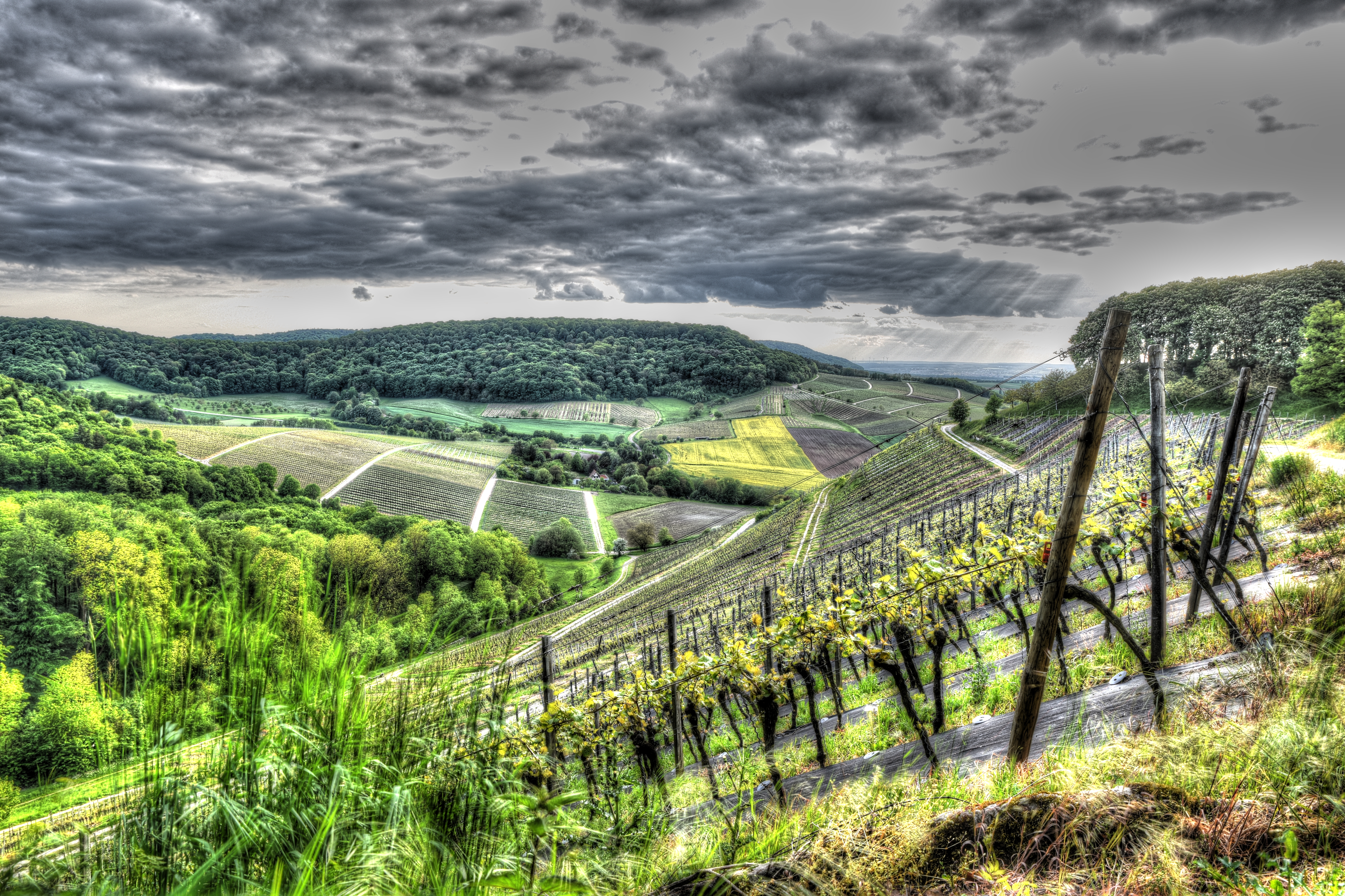 Weinberge süd-östlich gelegen von Castell